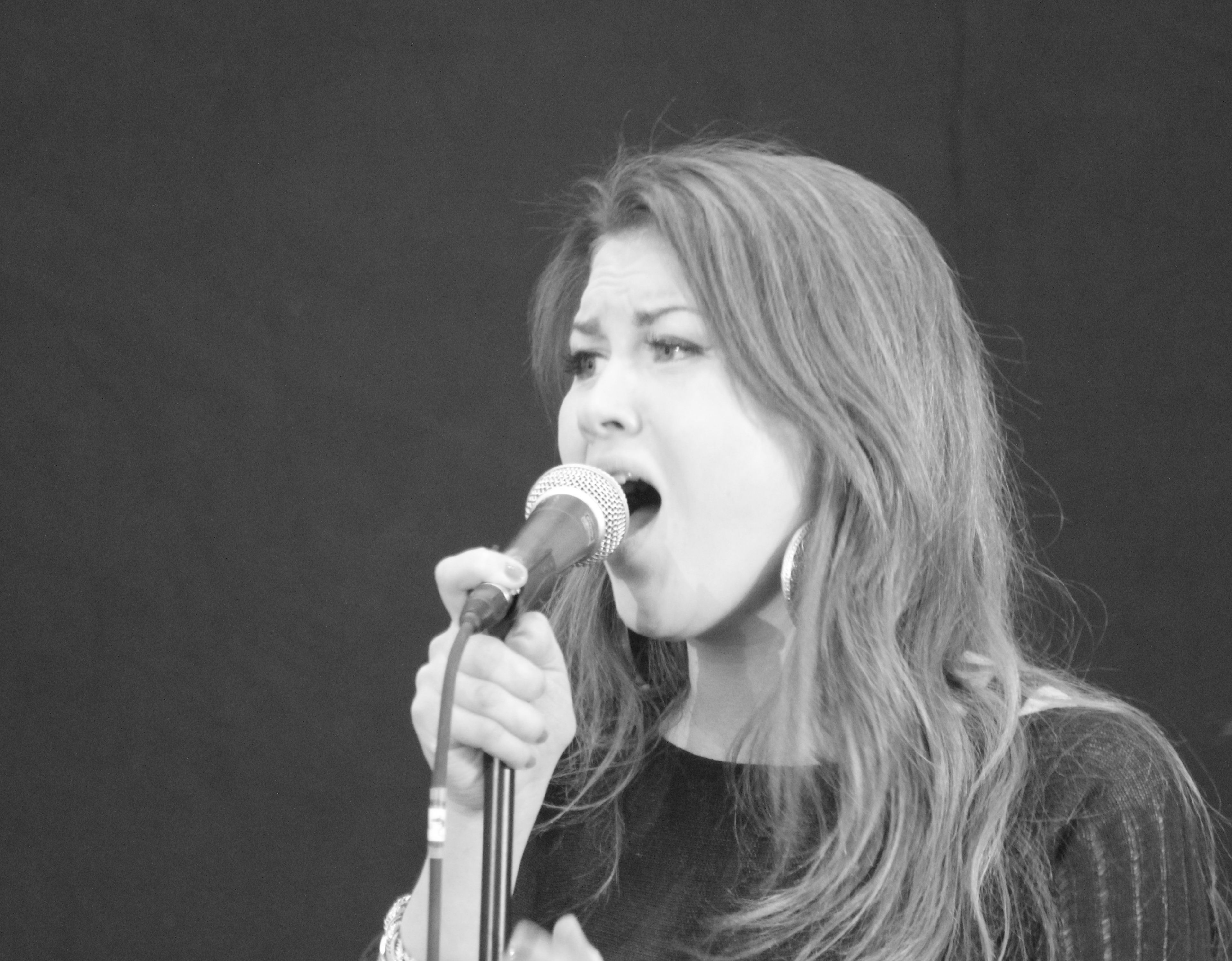 Elina Born esinemas Kristiine keskuses.